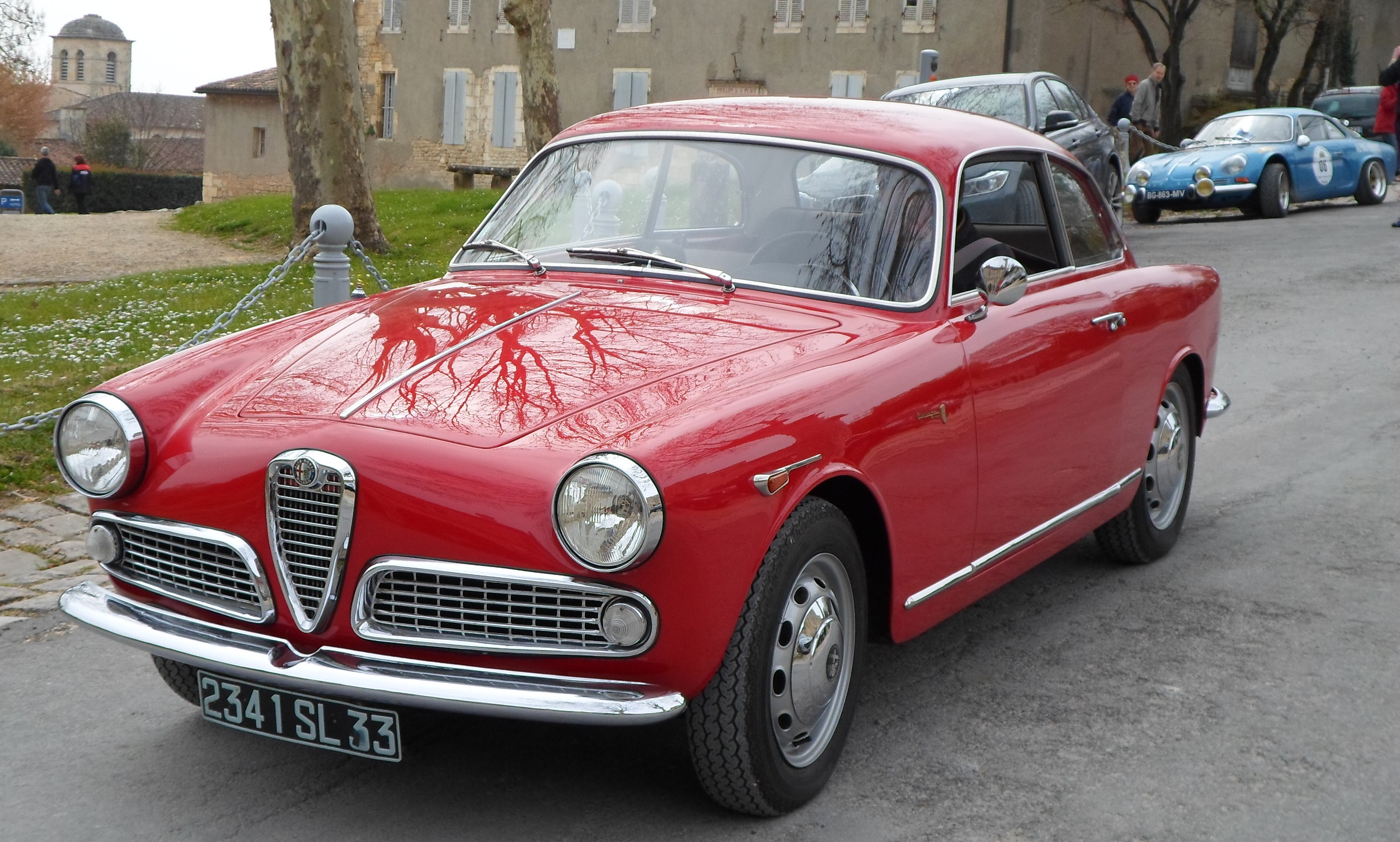 Alfa Romeo Giulietta Sprint Blaye 2013